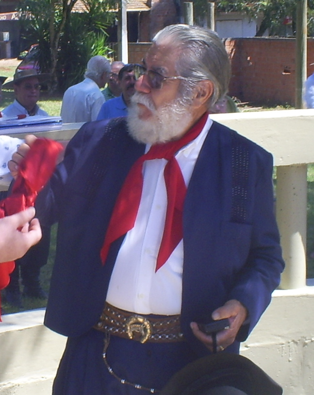 Músico Telmo de Lima Freitas em Passo Fundo/RS